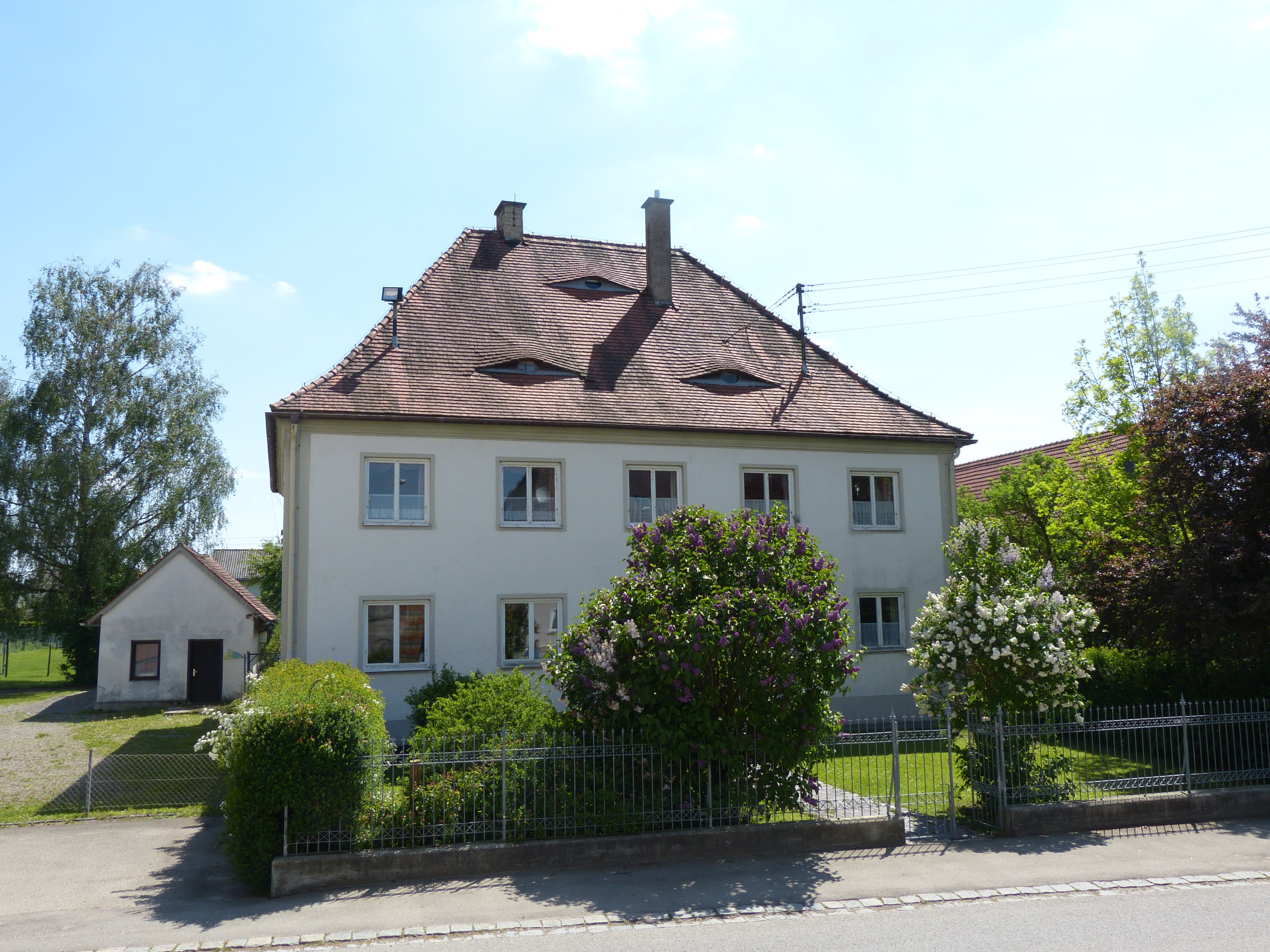 Niederrieden, Landkreis Unterallgäu, Bayern Pfarrhof in Niederrieden